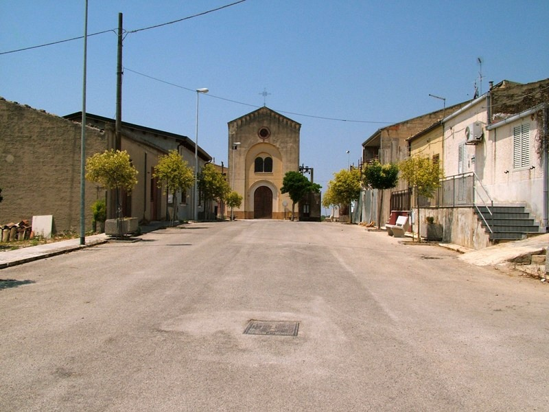 Mazzarrone: la chiesa della Madonna del Rosario, nel rione Cucchi.